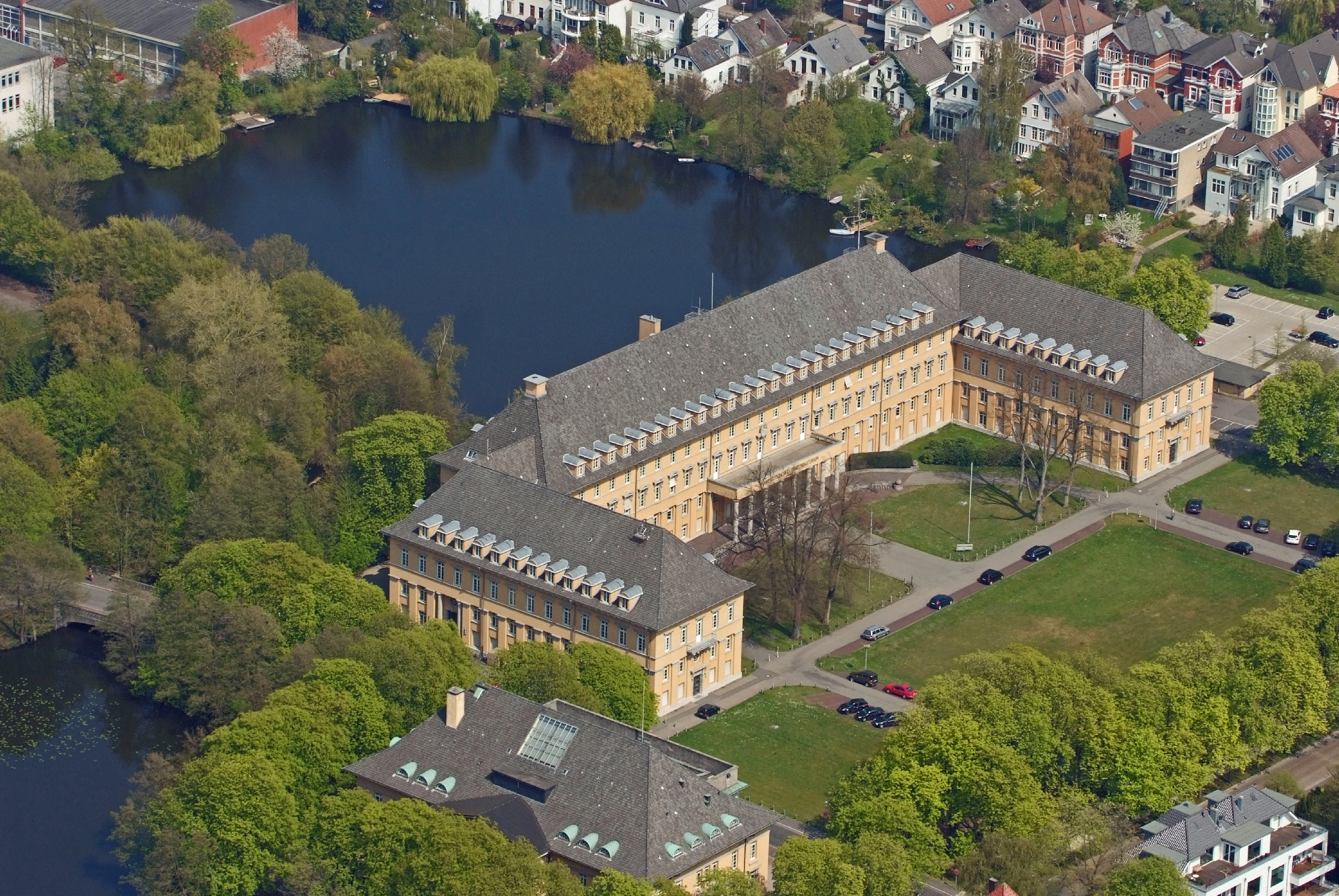 Fotoflug von Nordholz-Spieka nach Oldenburg und Papenburg